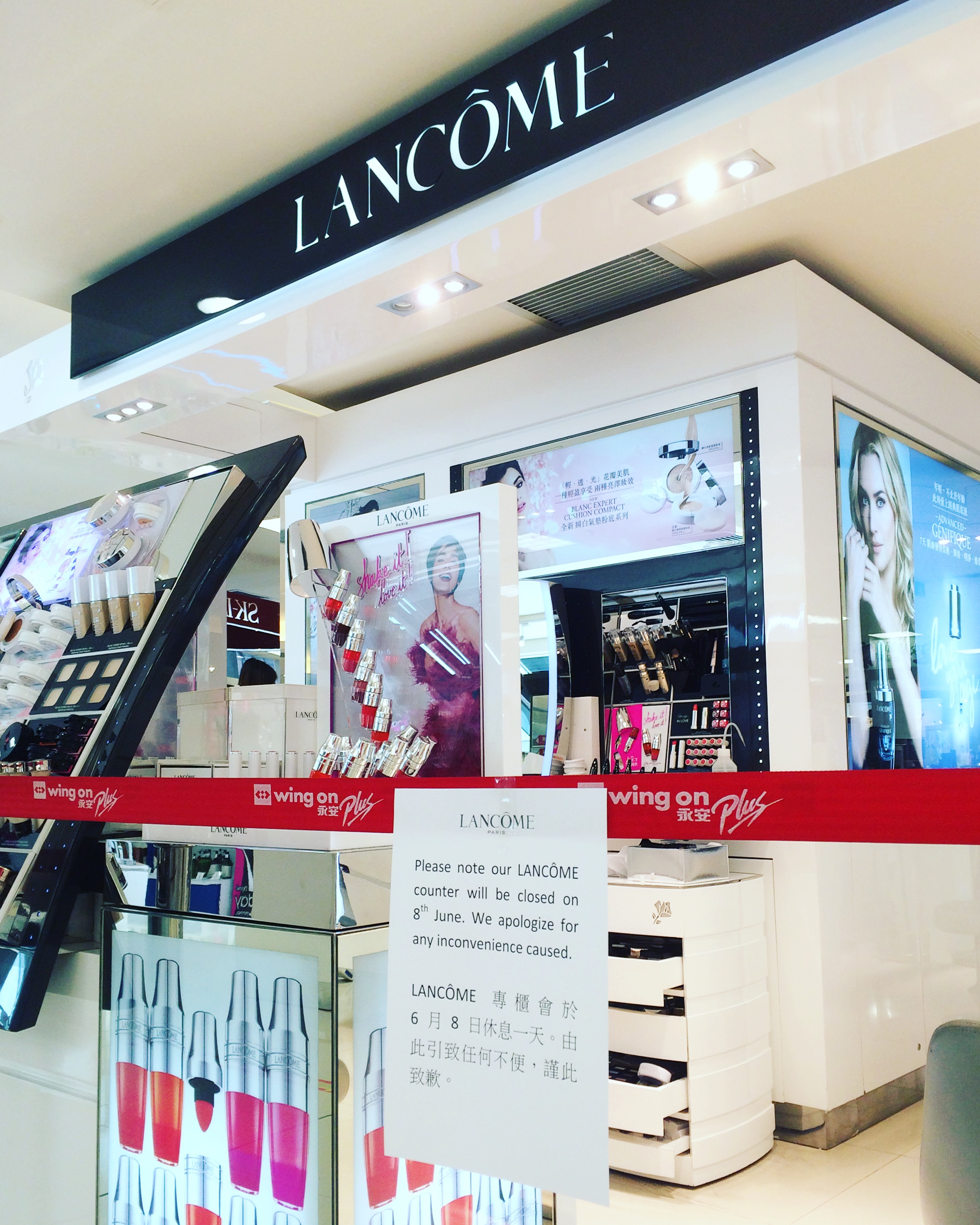 Lancôme kiosk in ETST